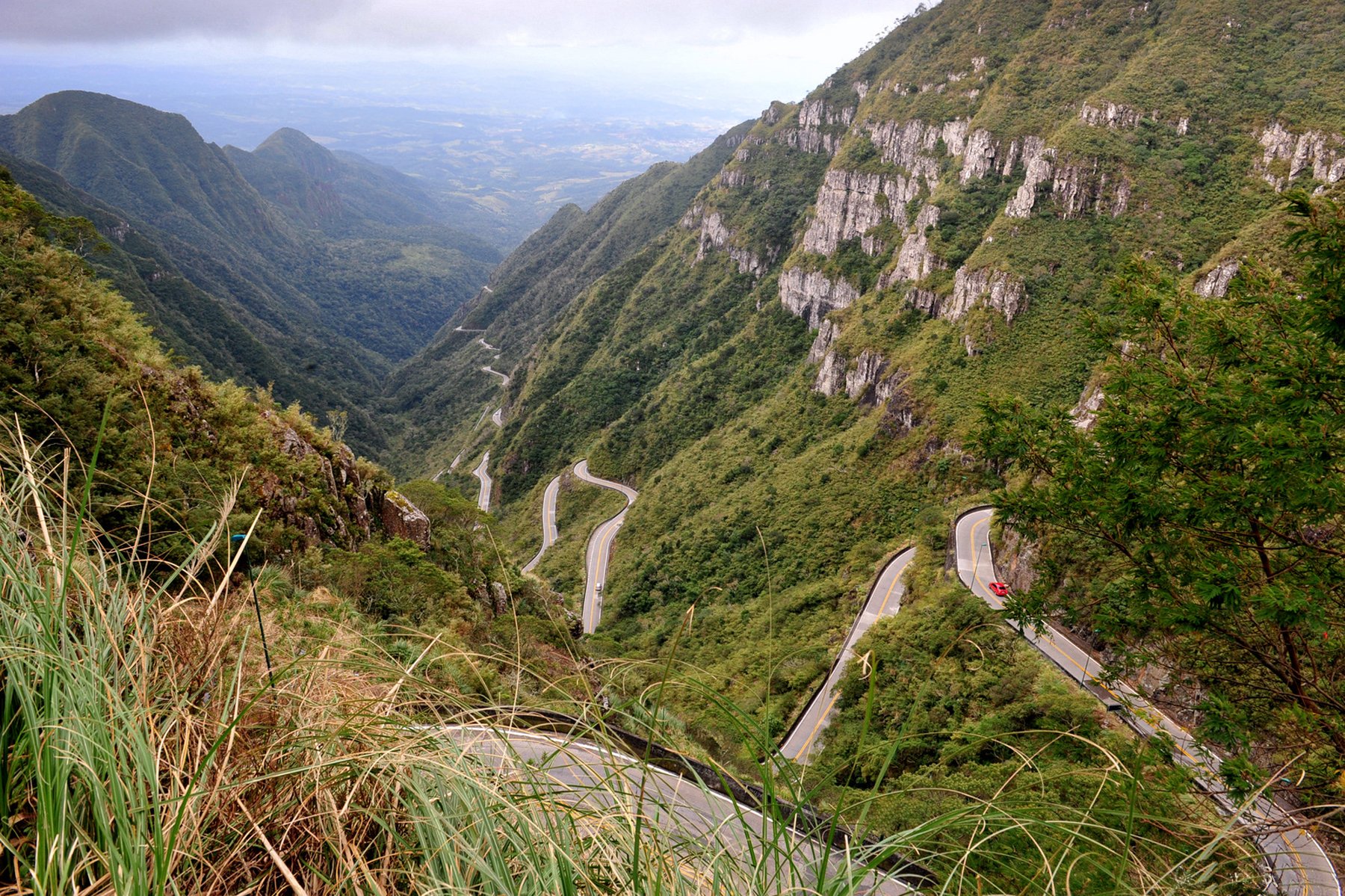 A Serra do Rio do Rastro é uma das serras de Santa Catarina, localizada no sul do estado. É cortada pela rodovia SC-390, onde se tem uma espetacular vista da serra. Com muitas matas e cachoeiras, é um dos cartões-postais do estado. O Quati (Nasua sp.) é um mamífero nativo que ocasionalmente aparece no mirante vindo das matas próximas.